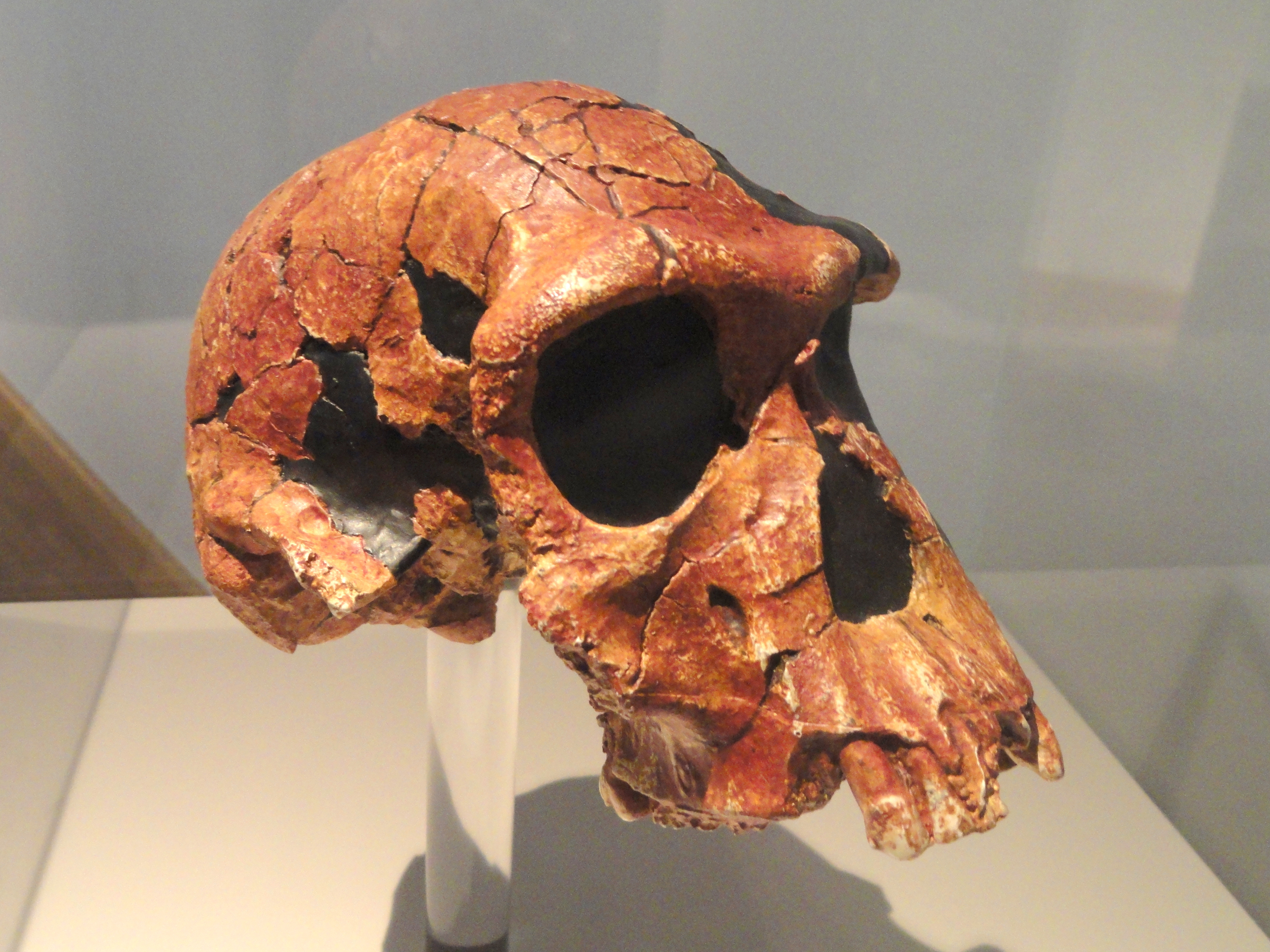 Exhibit in Naturmuseum Senckenberg, Frankfurt am Main, Germany.